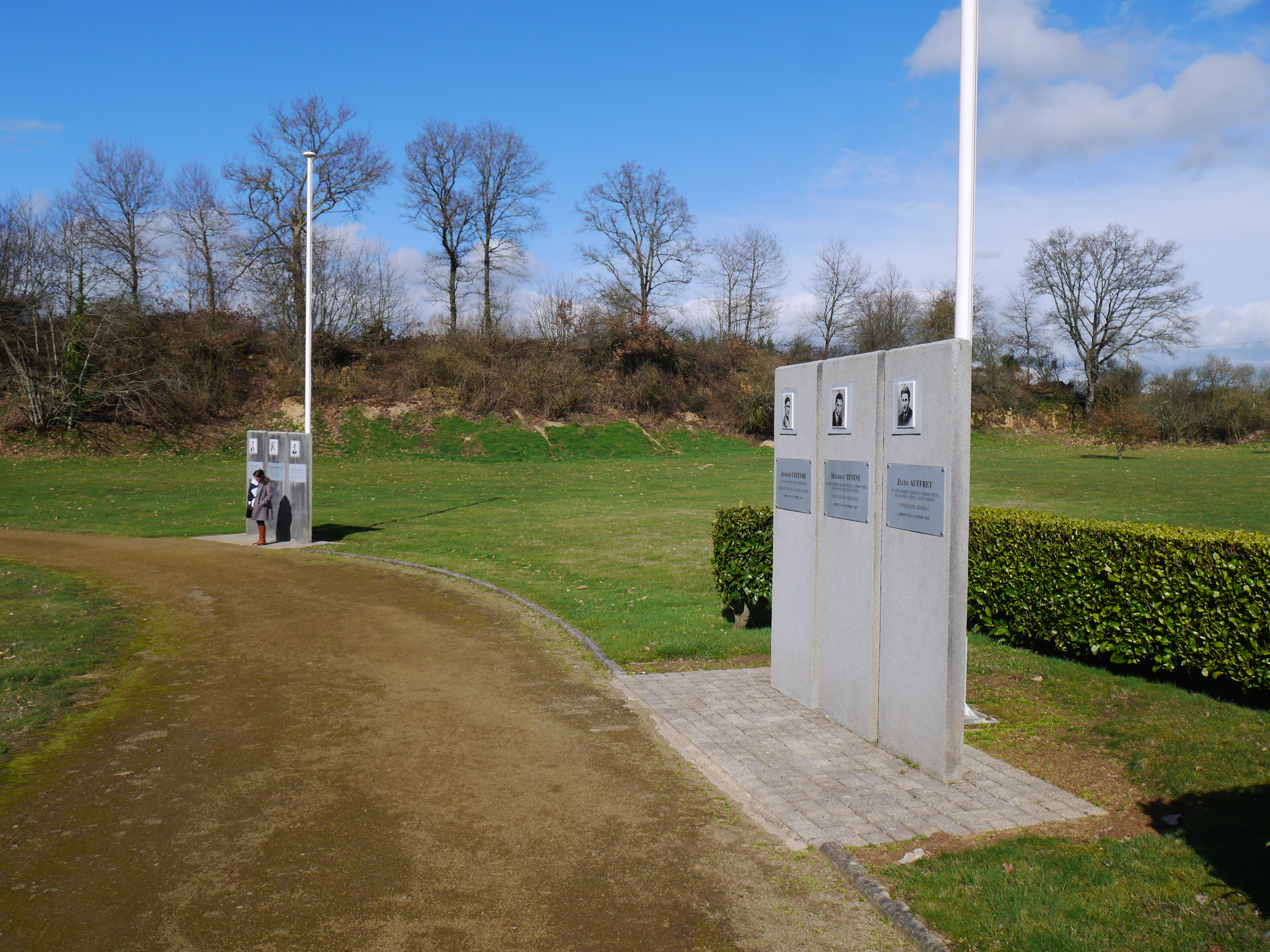 Quelques stèles en hommage aux fusillés.